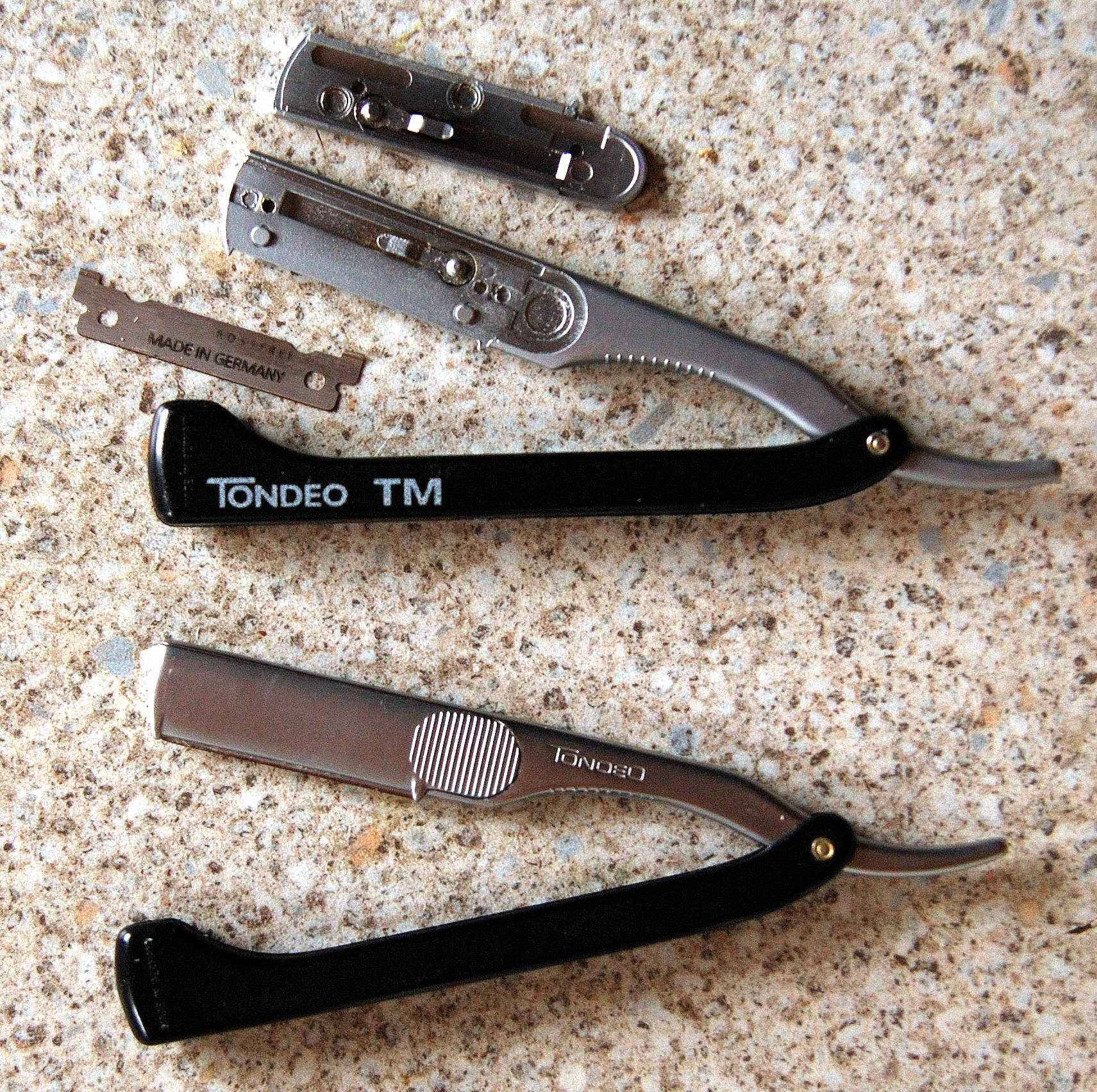 Shavette (Rasiermesser mit Wechselklinge)